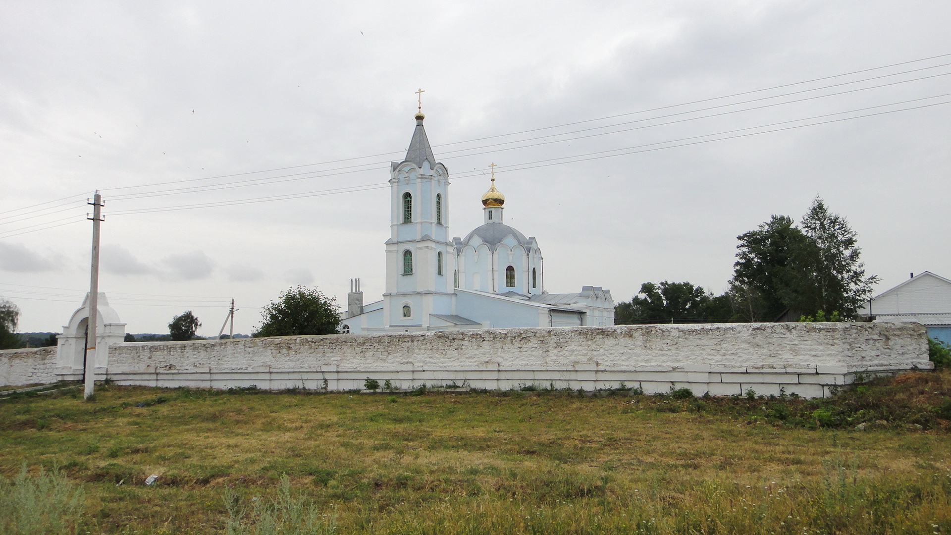 Церковь Архистратига Михаила (Церковь Успения) (Липецкая область, Елец, село Стегаловка)